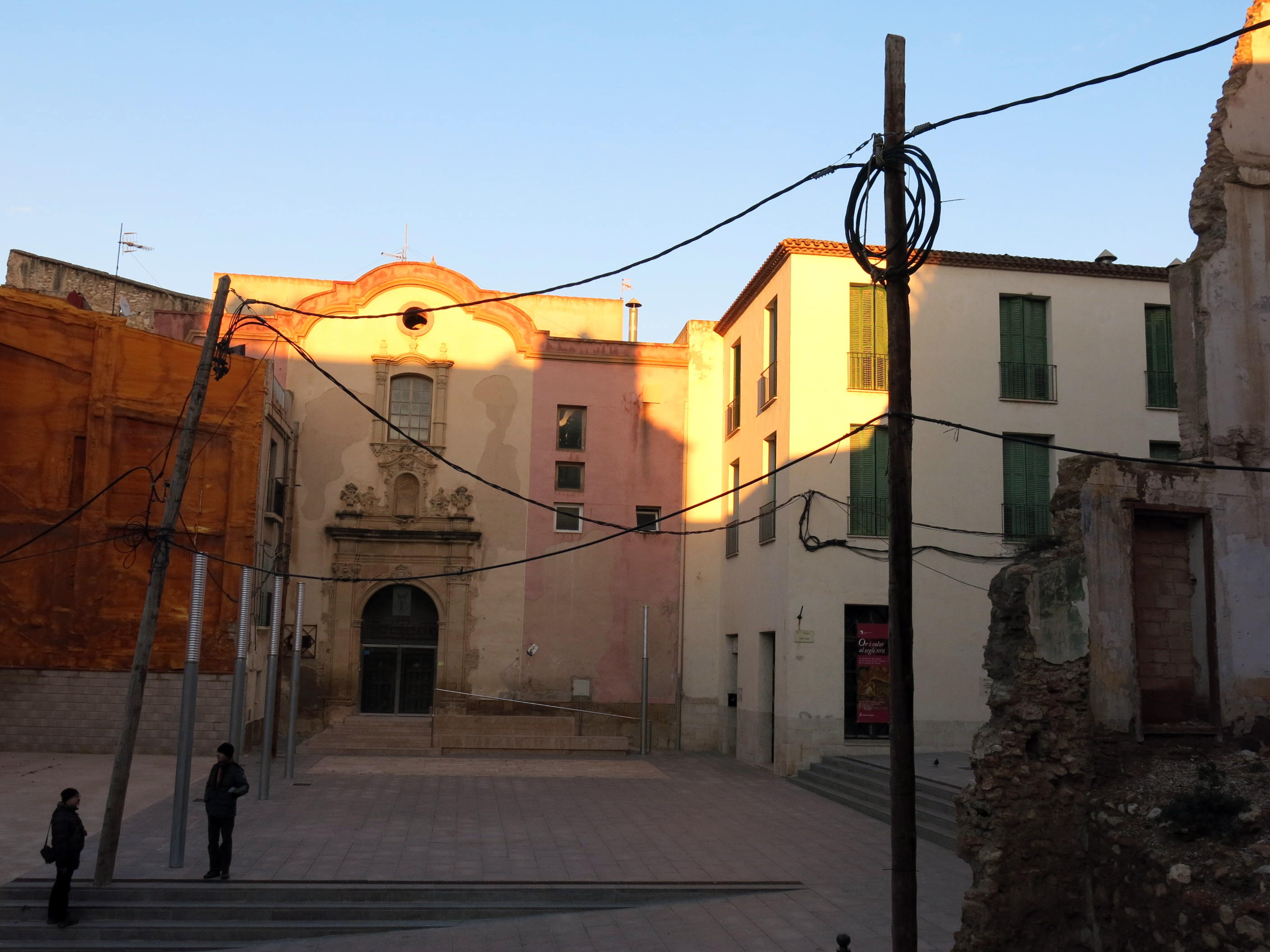 Antic convent i església de Sant Joan (Tortosa)